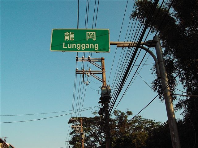 龍岡在龍南路上的路標（2005年拍攝）